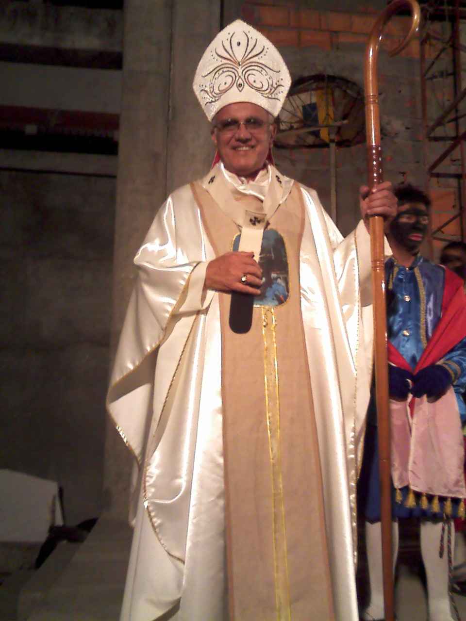 Io Maria Alejandra Guillermo, rilascio a Wikimedia Italia l'immagine 011610926.jpg di mia proprietà raffigurante l'Arcivescovo di Mérida in licenza cc-by-sa sotto il Nome Baltazar Porras 2.jpg. Provvedo io stessa a caricarla su Commons.--Maria Alejandra Guillermo (msg) 12:28, 28 gen 2010 (CET)